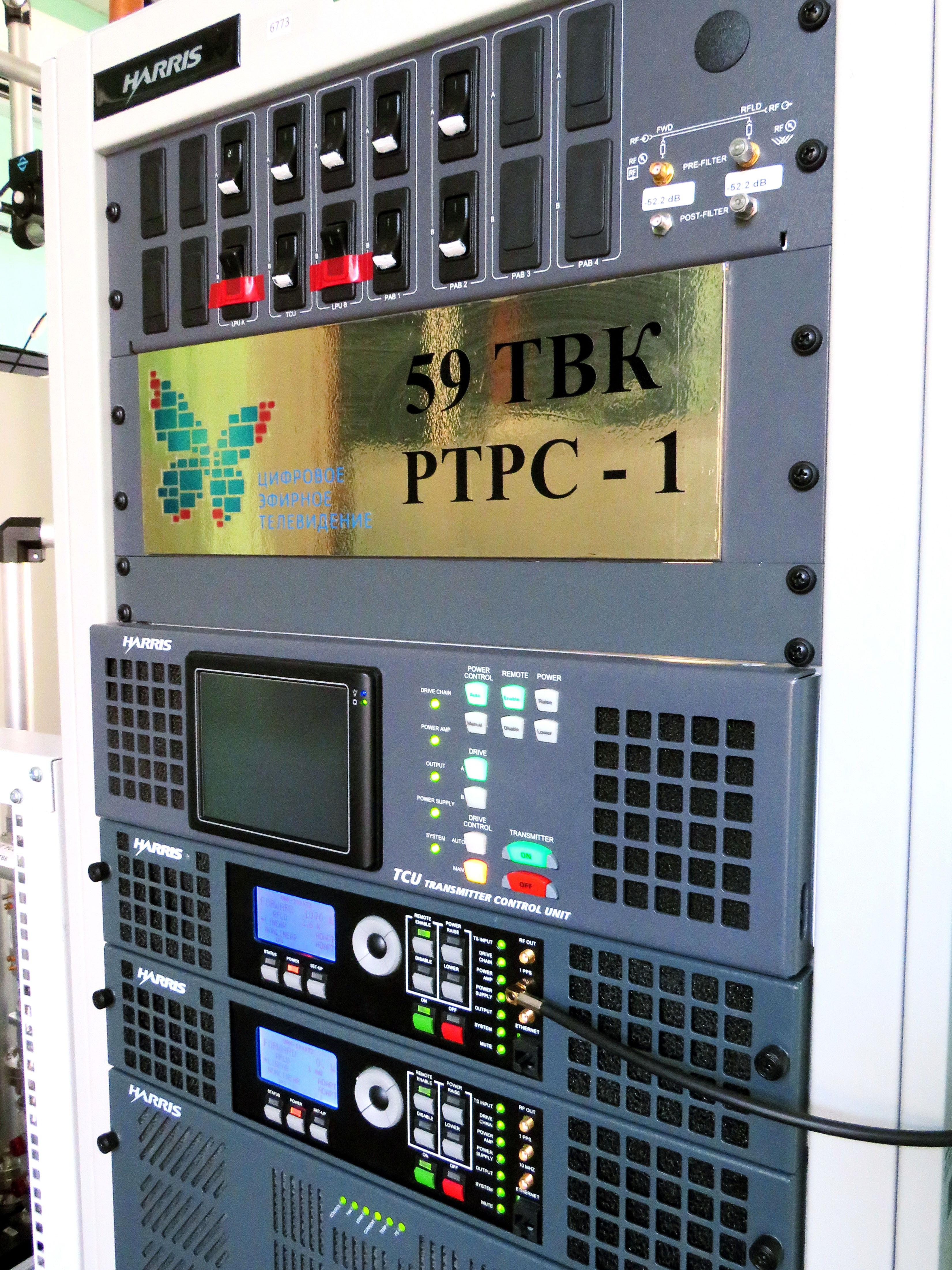 ТВ-передатчик филиала РТРС "Ивановский ОРТПЦ"